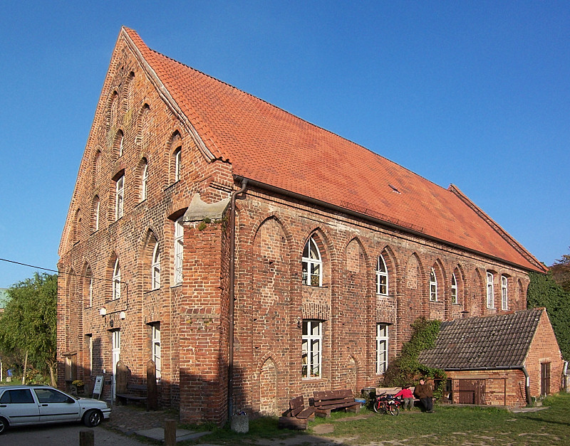 Korn- und Brauhaus im Kloster Bad Doberan